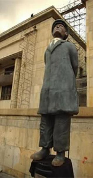 Leyenda bogotana de los años 40